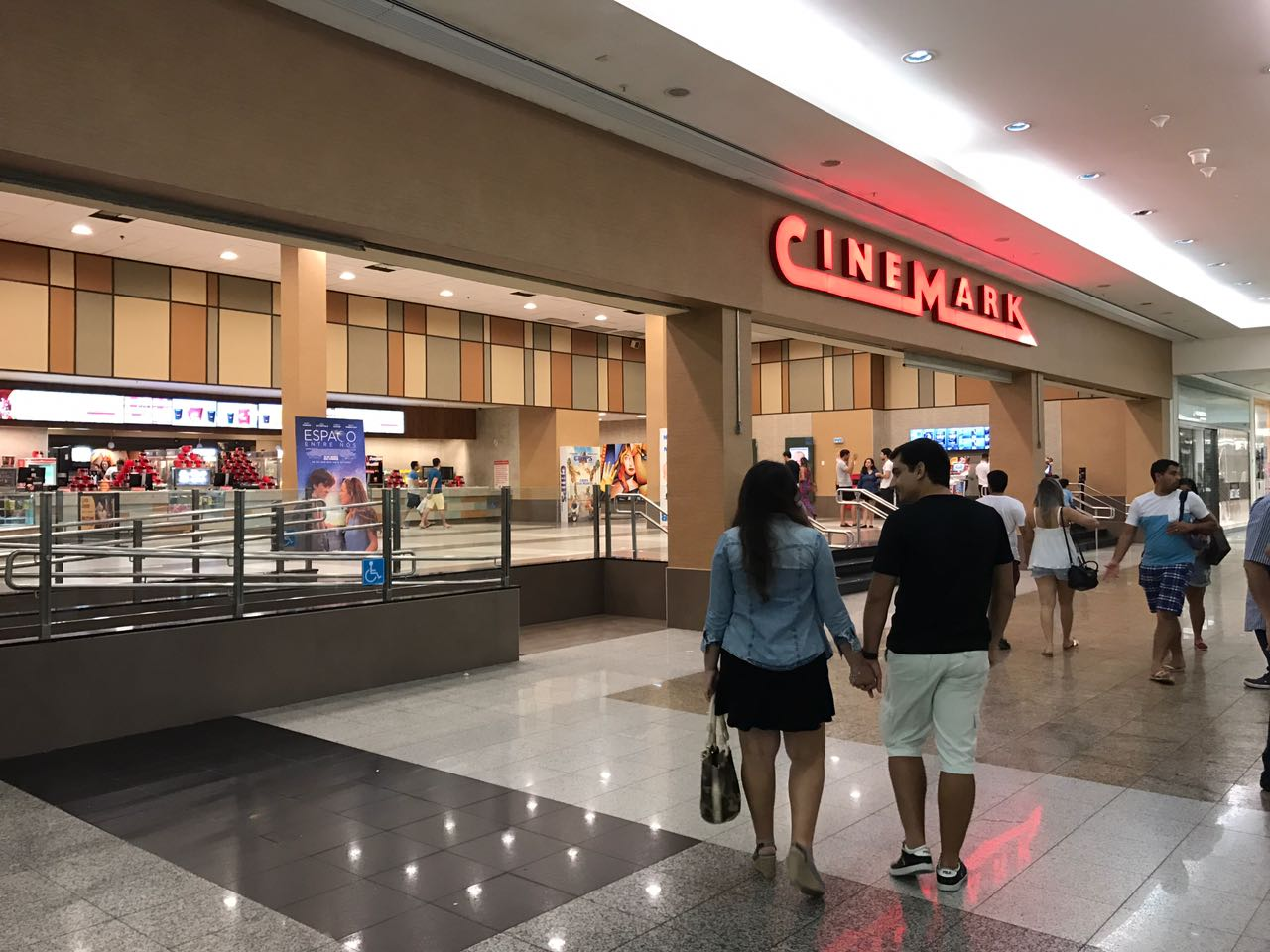 Vista Lateral do Cinemark Midway Mall de Natal, RN